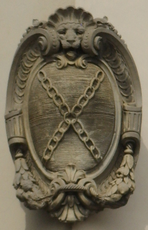 Palazzo bardi-tempi stemma alberti2